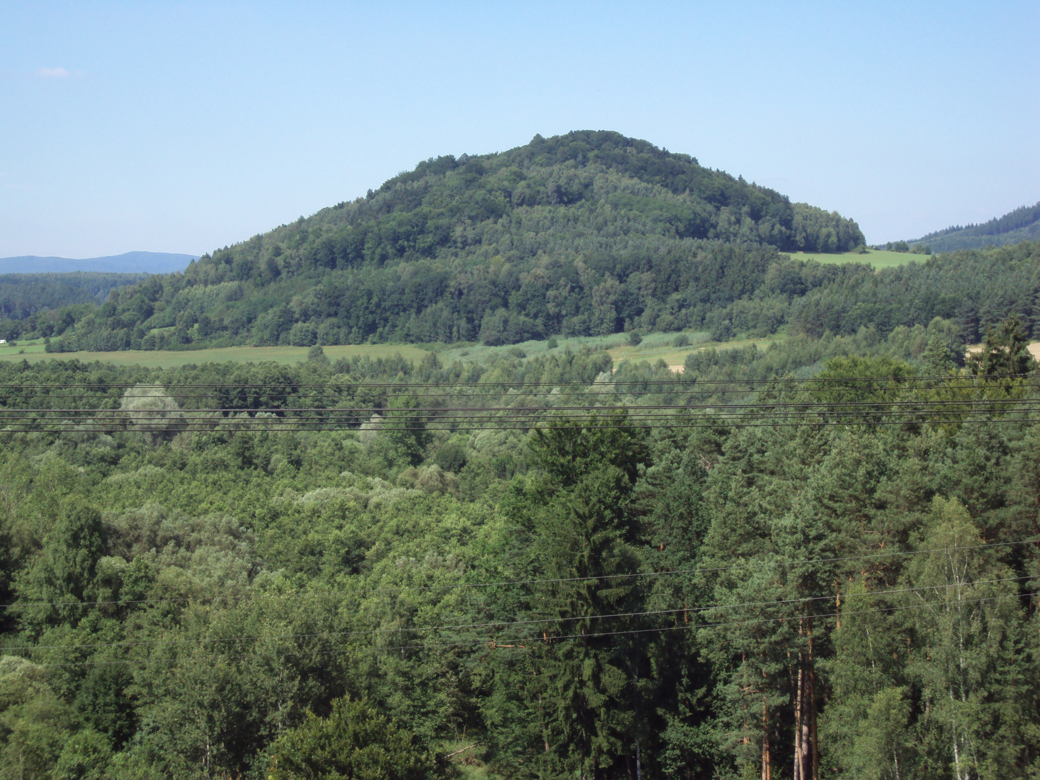 Velenický kopec z jihu, z návrší zákupské naučné stezky